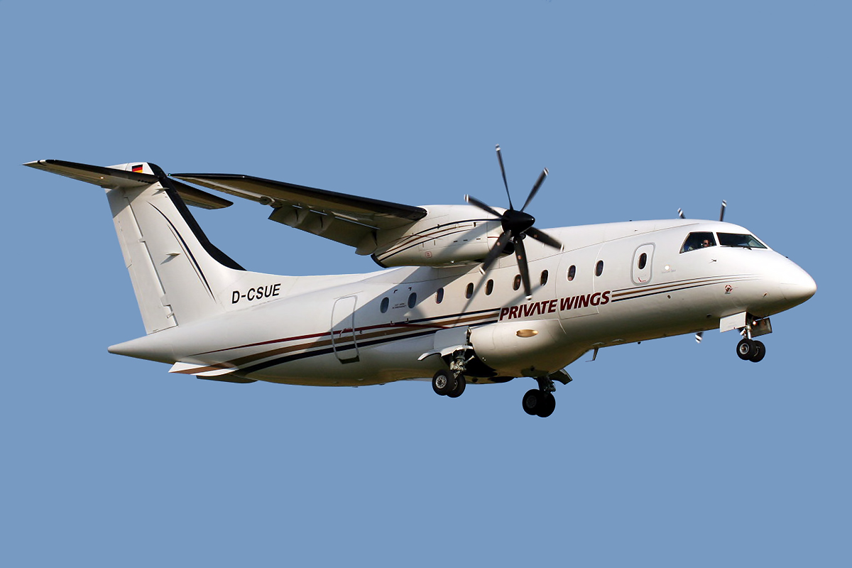 Ingolstadt Manching Airport (ETSI/EGS)